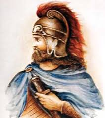 Վարդան Մամիկոնյան